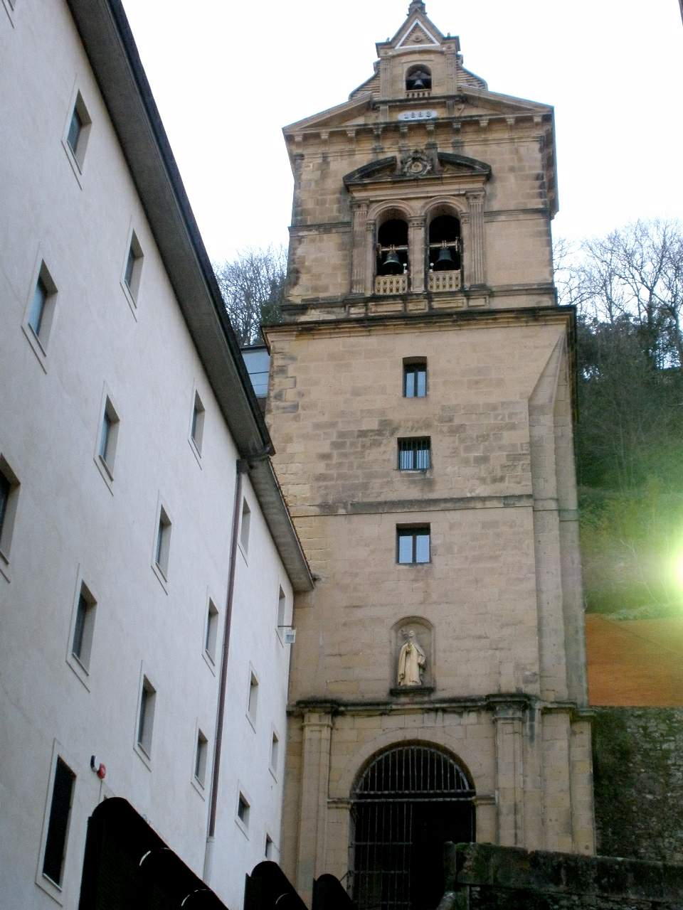 San Sebastián